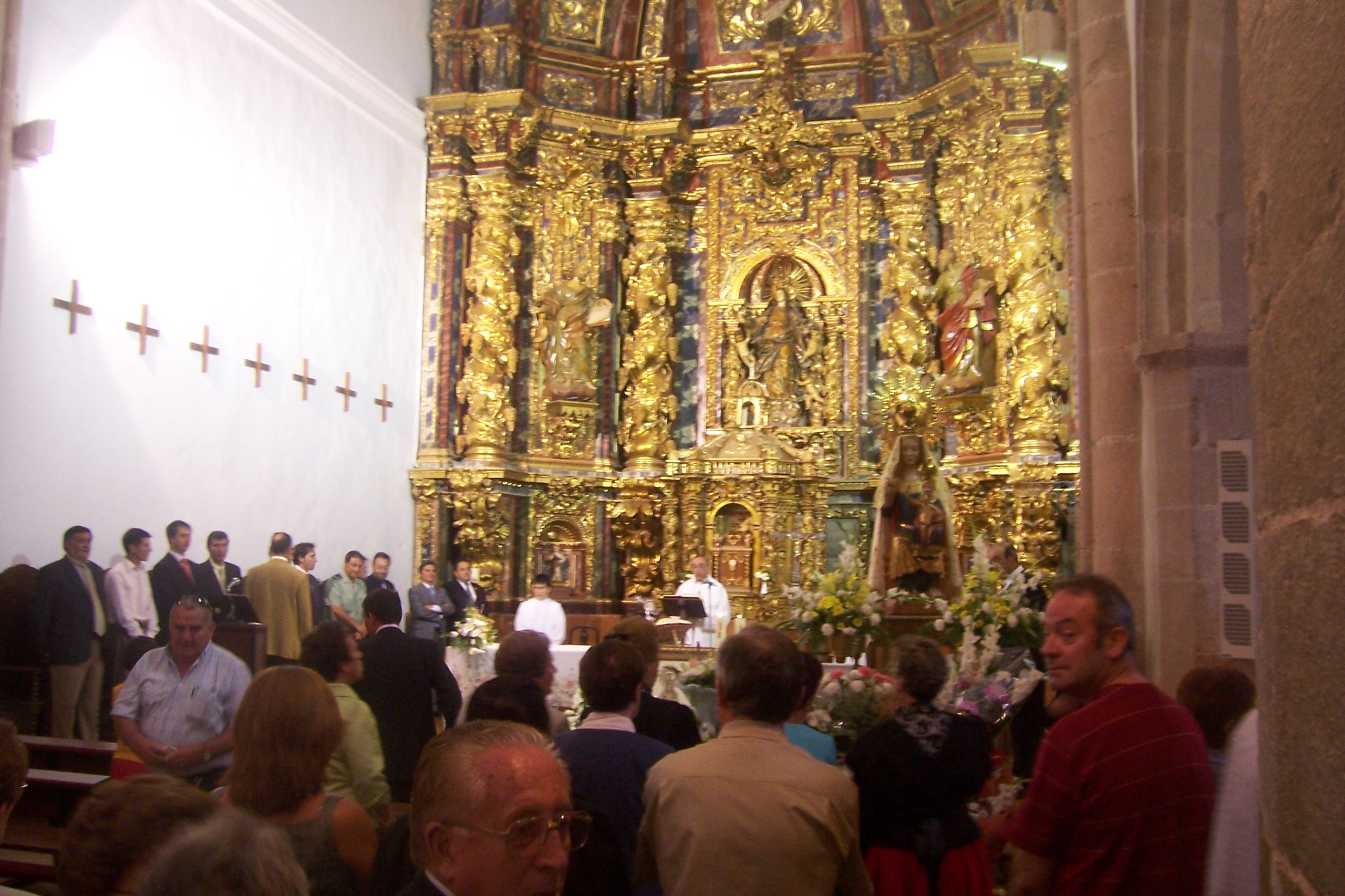 Interior de la Iglesia de Serón de Nágima